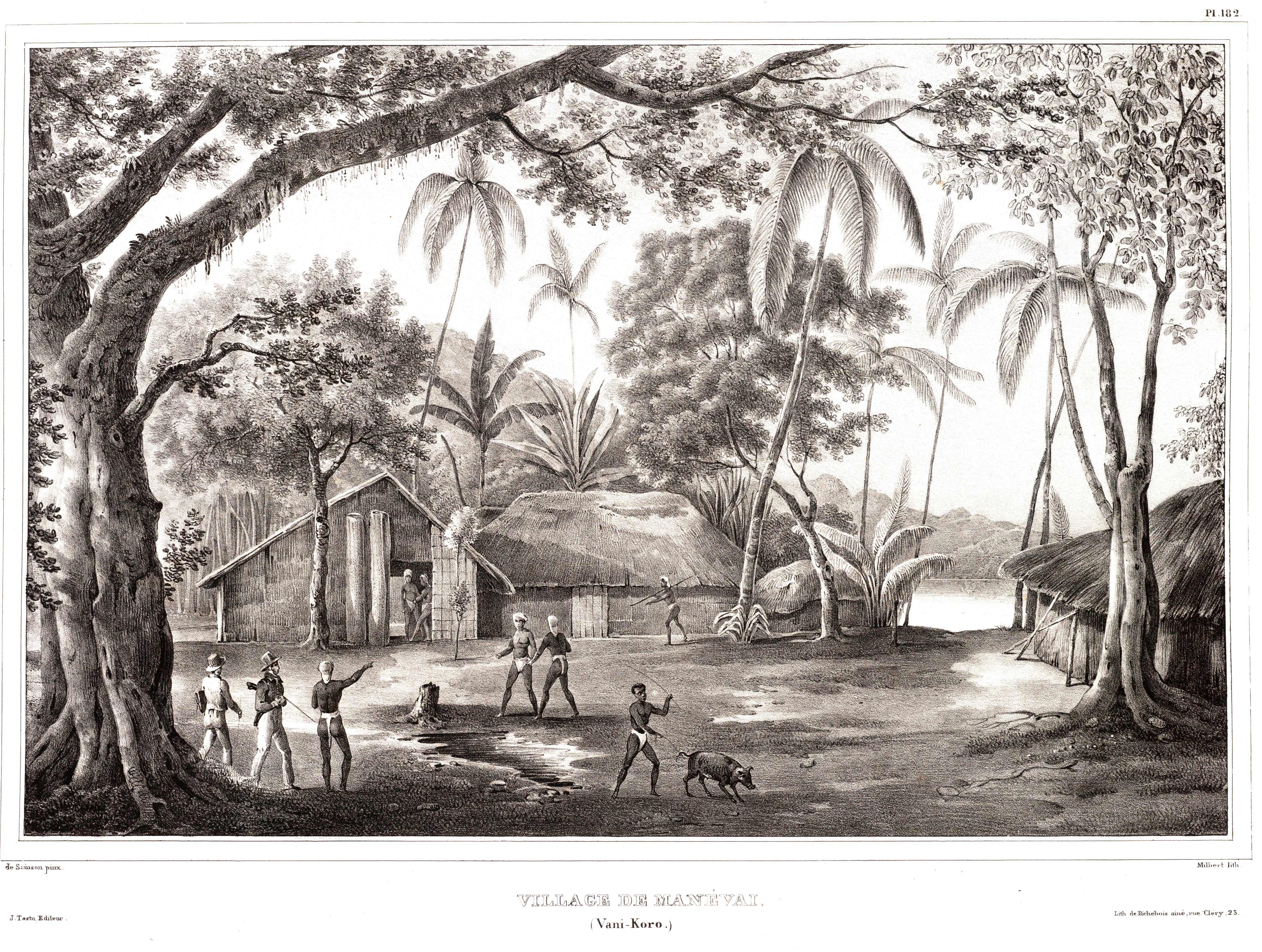 Village de Manevai, Vanikoro, 1833. Expédition de Jules Dumont d'Urville.